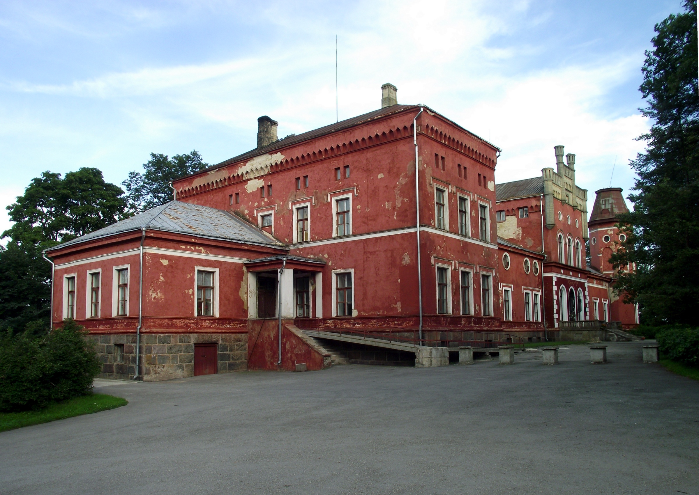 Porkuni mõisa peahoone